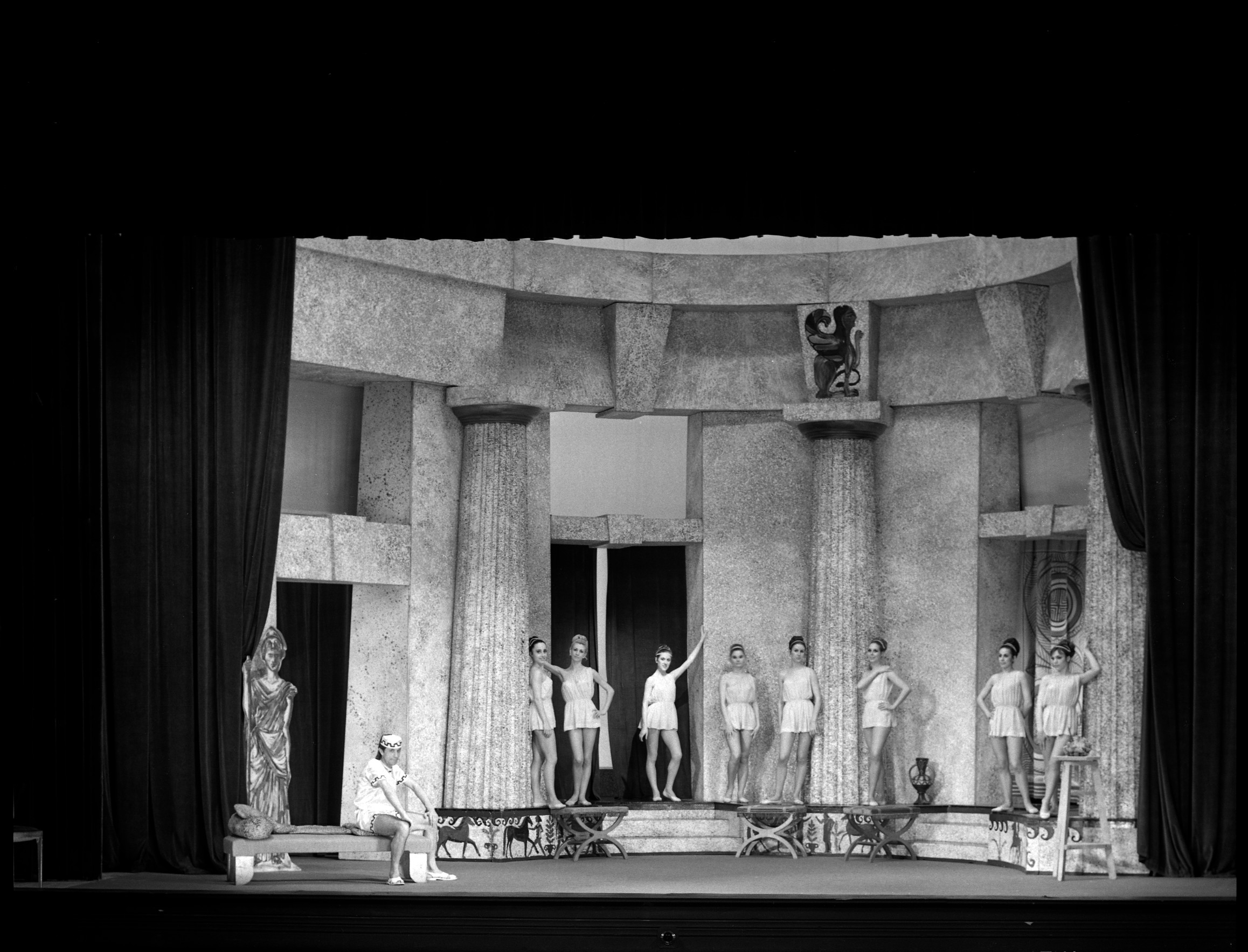 Théâtre du Capitole. Le 2 Mai 1969. Vue du décor de Phi-phi au théâtre du Capitole.